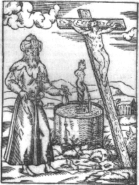 a medieval picture showing the libel of a jew poisoning a well and so causing the black death